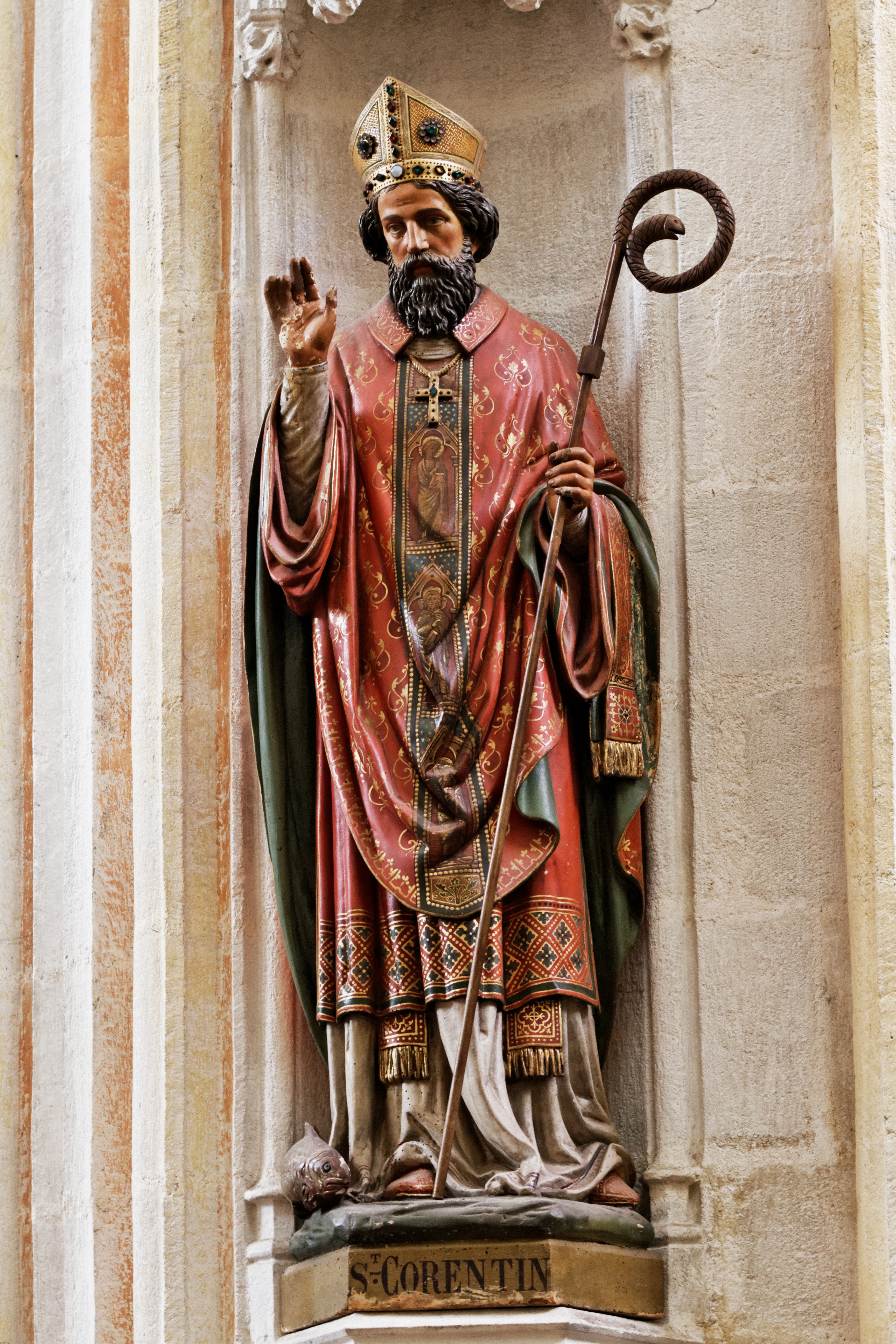 La cathédrale Saint-Corentin à Quimper dans le Finistère.